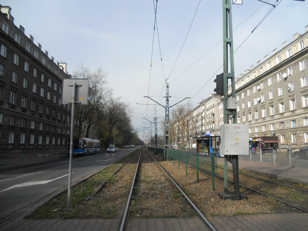 Początek Alei gen. W. Andersa przy Placu Centralnym, Kraków.